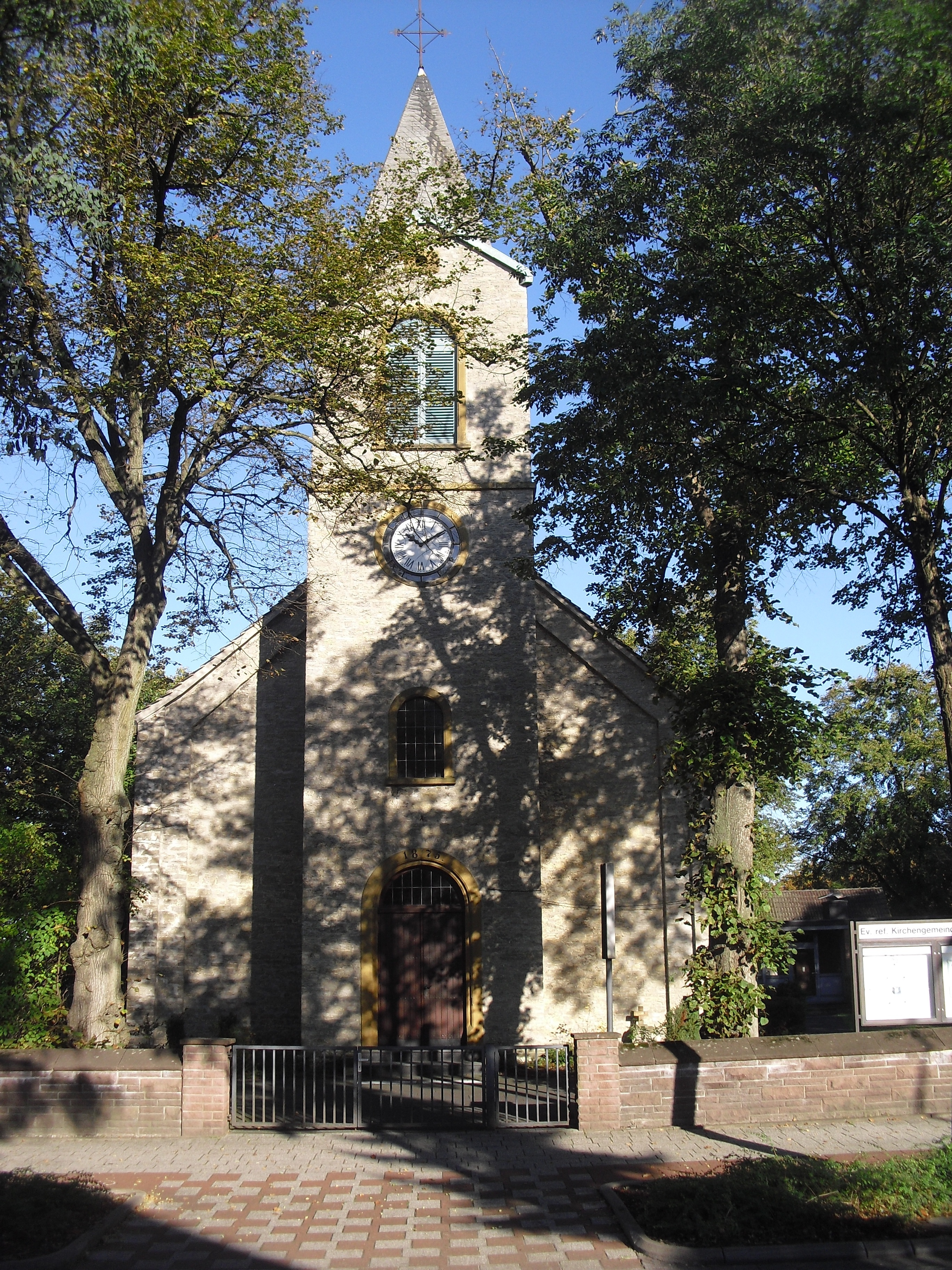 Ev. Kirche in Augustdorf This is a photograph of an architectural monument. 02